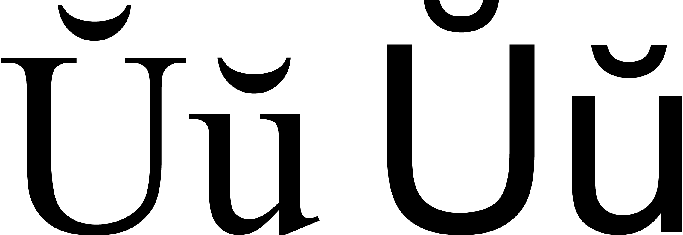 Letra latina u com breve (Ŭ e ŭ) nas fontes Times New Roman e Arial